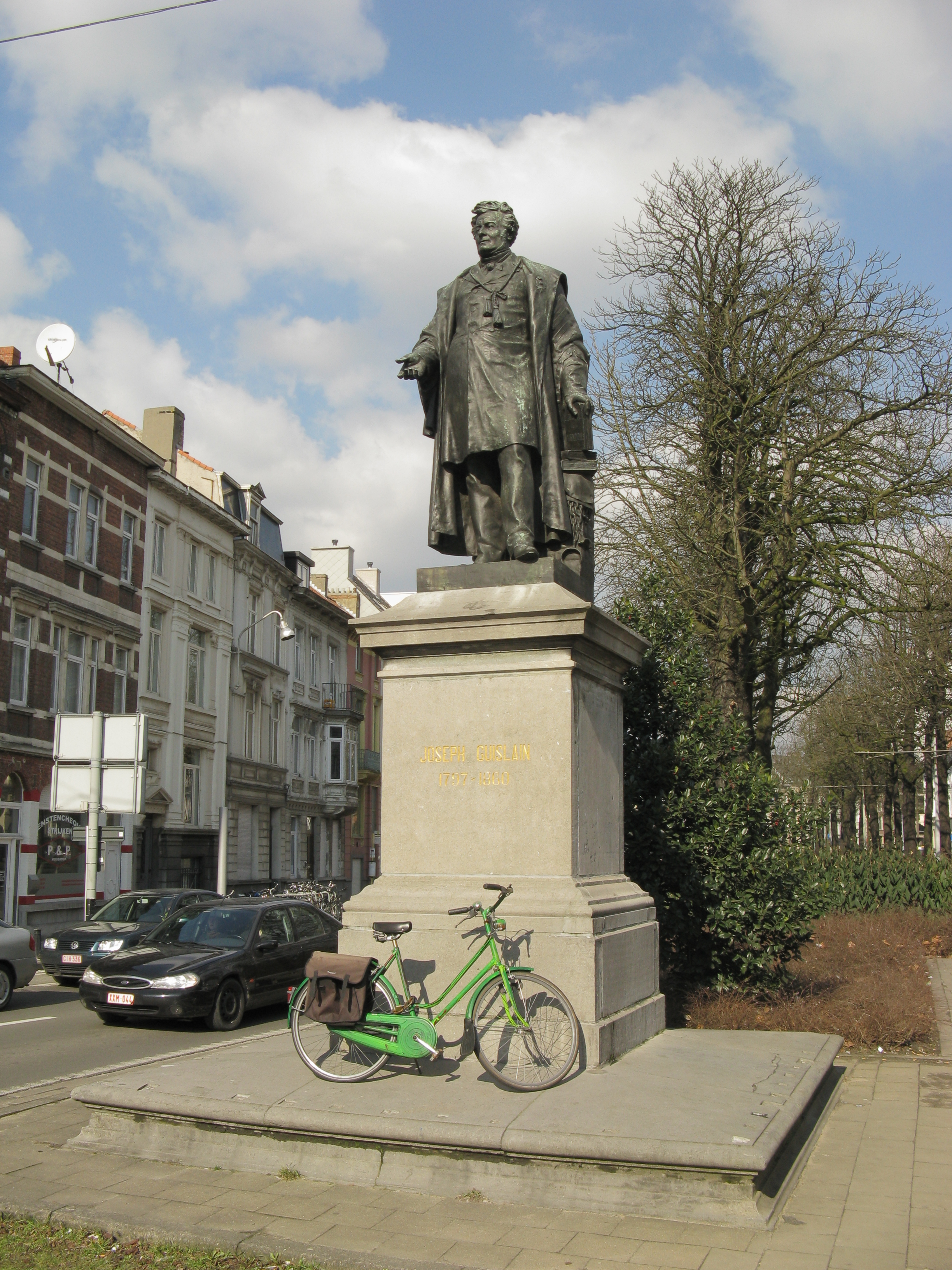 Standbeeld van Joseph Guislain aan de 'Duizend Vuren' (Brugse Poort) in Gent, België.